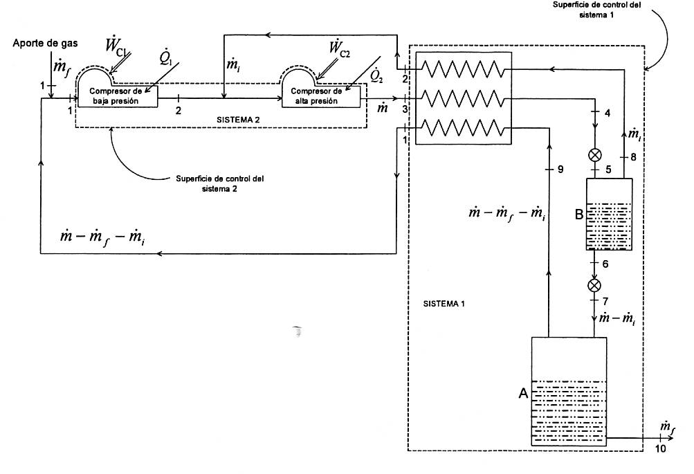 Esquema de una planta de licuación de gases mediante el sistema de Linde-Hampson dual